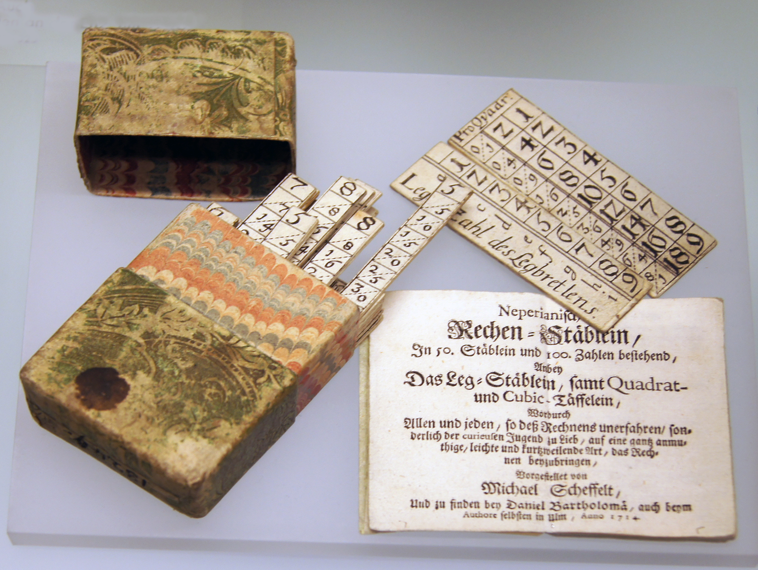 Neperianische Rechenstäblein, Ulm, 1614; Landesmuseum Baden-Württemberg, Stuttgart